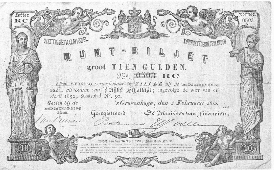 Muntbiljet uit 1875. Auteursrecht verlopen.